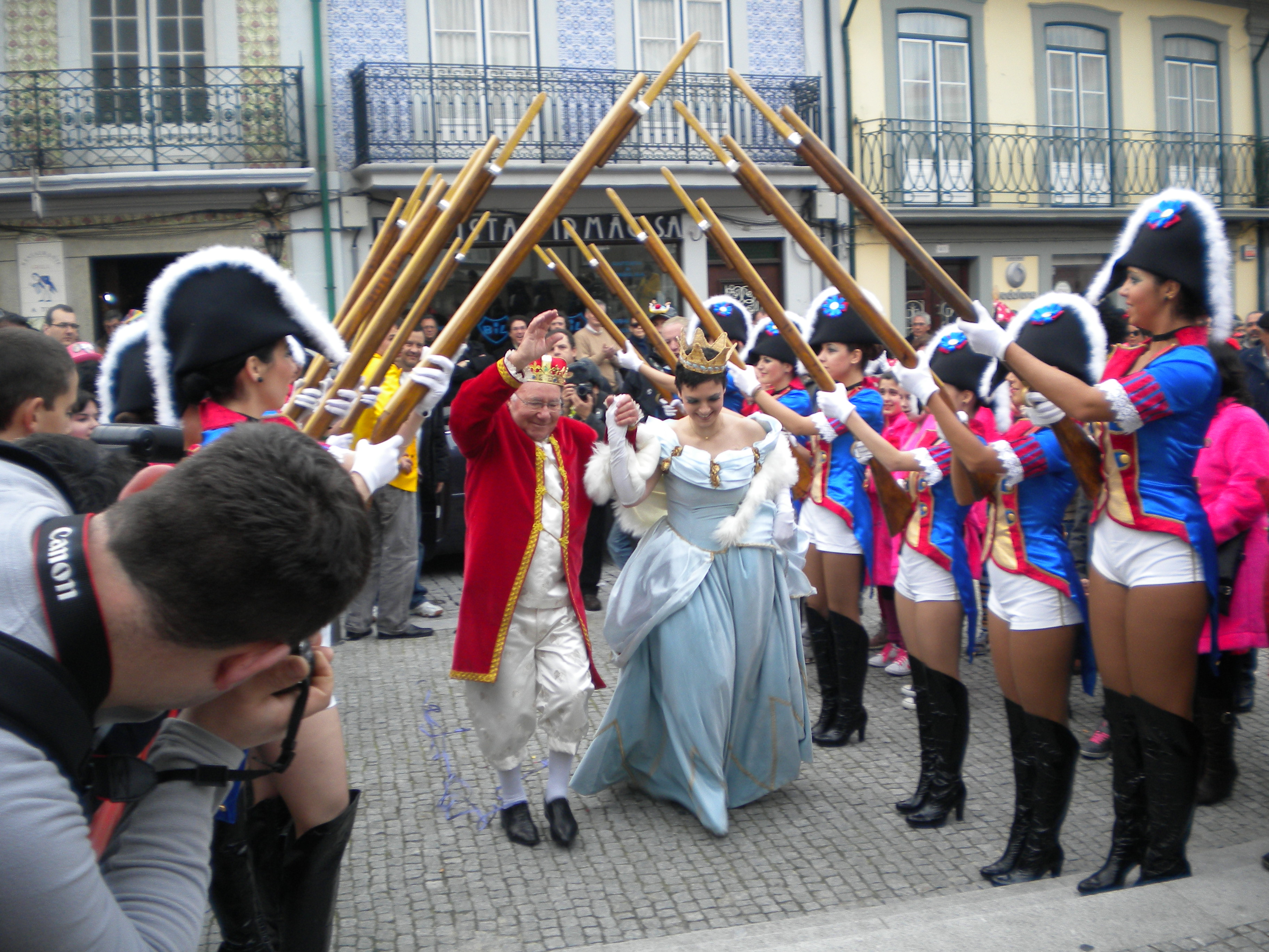 Carnaval de Ovar 2011 - Chegada do Rei 3